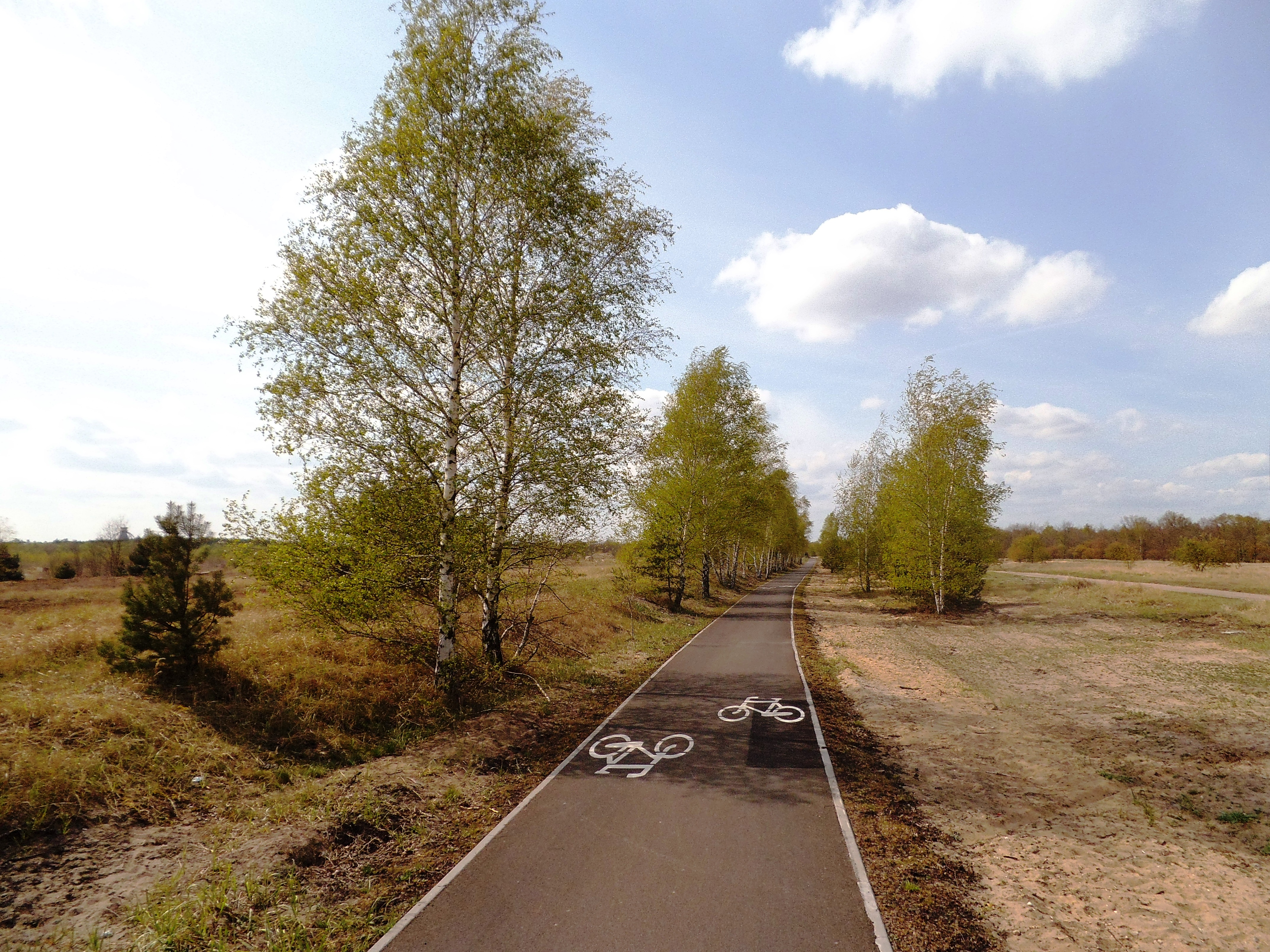 Droga rowerowa w Toruniu, dawny Polchem